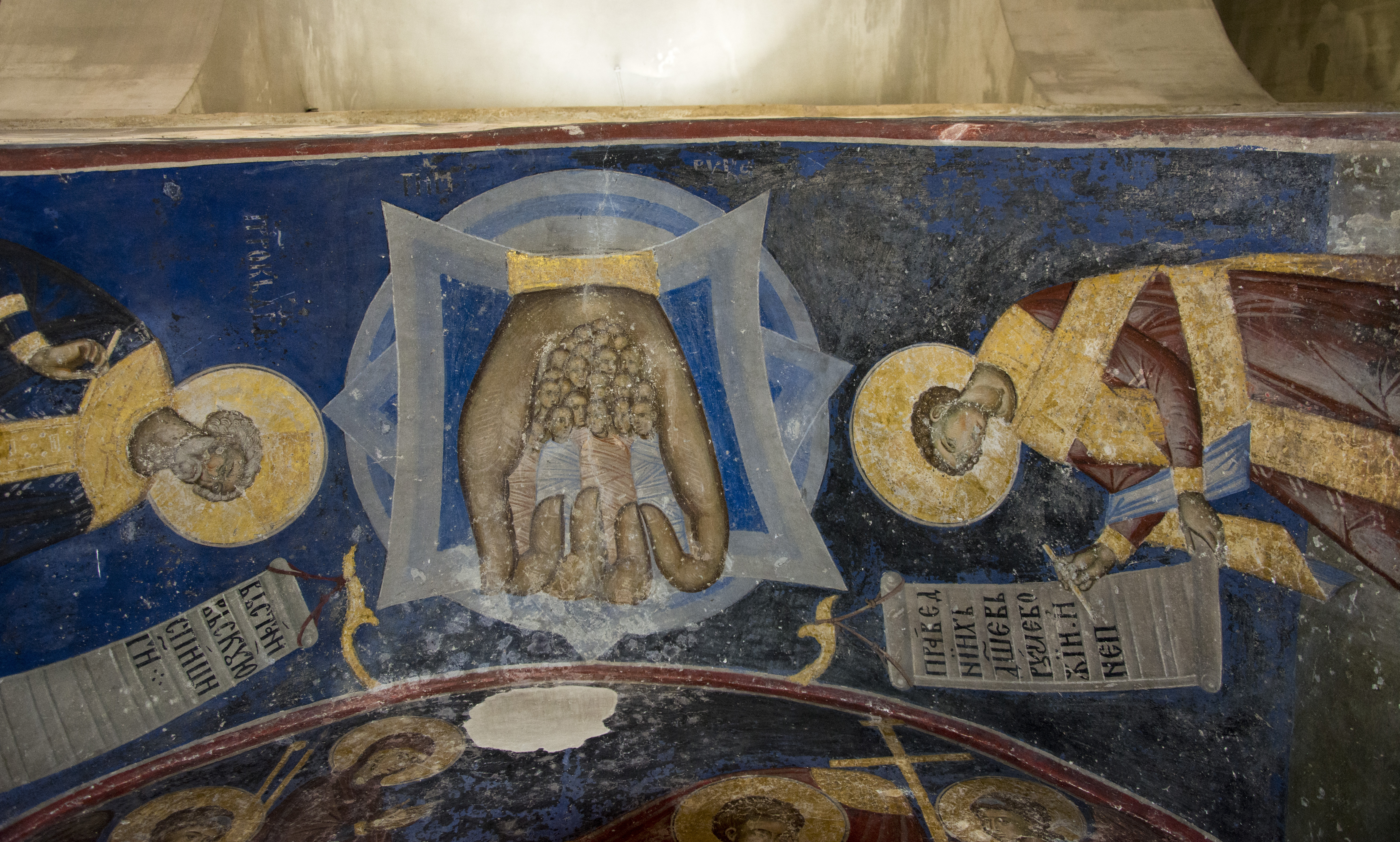 Сцена Рука Божија са душама праведних насликана у своду улаза у цркви Св. Тројице